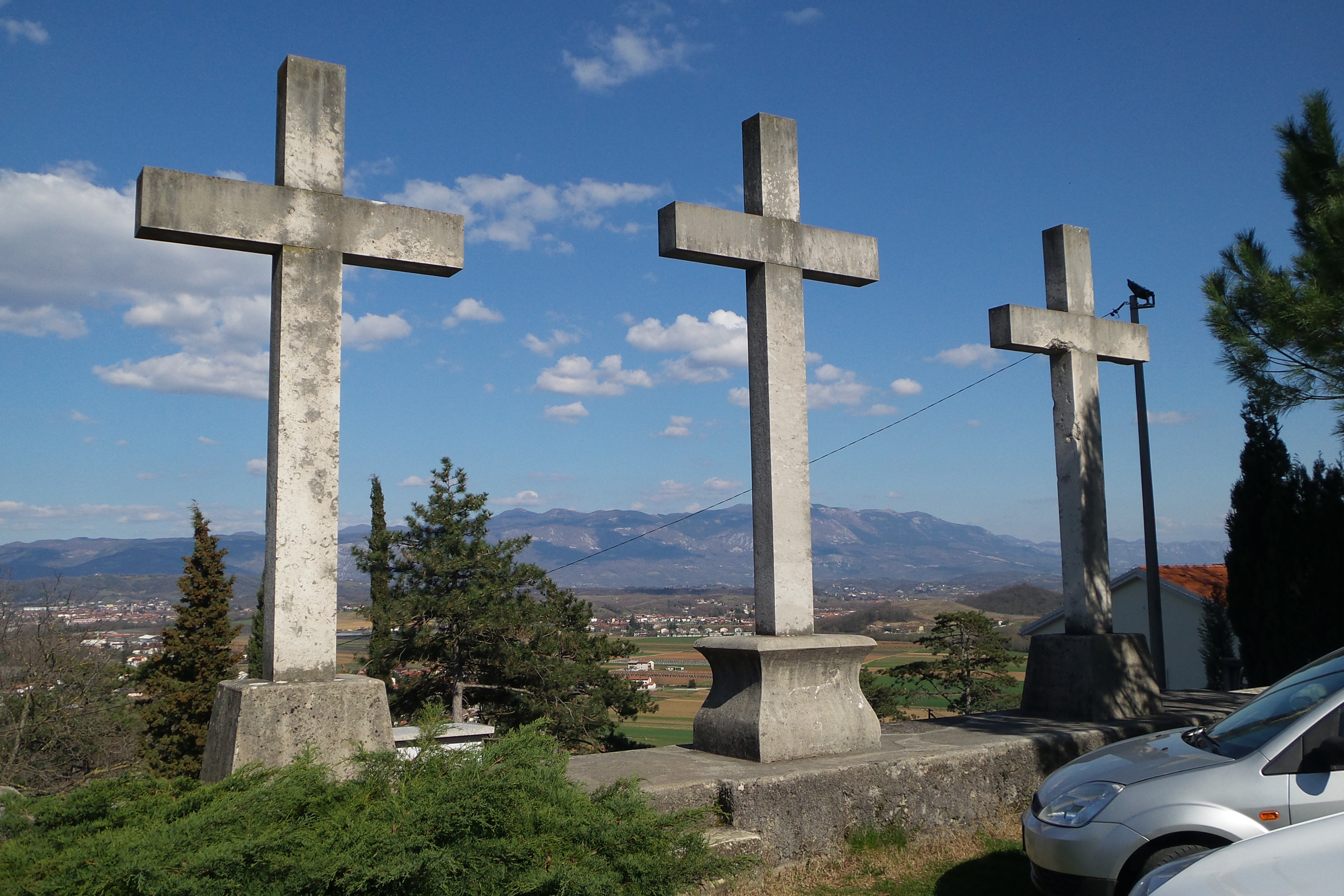 Kalvarija